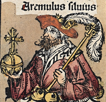 Зображення Ромула Сільвія у Нюрнберзькій хрониці.